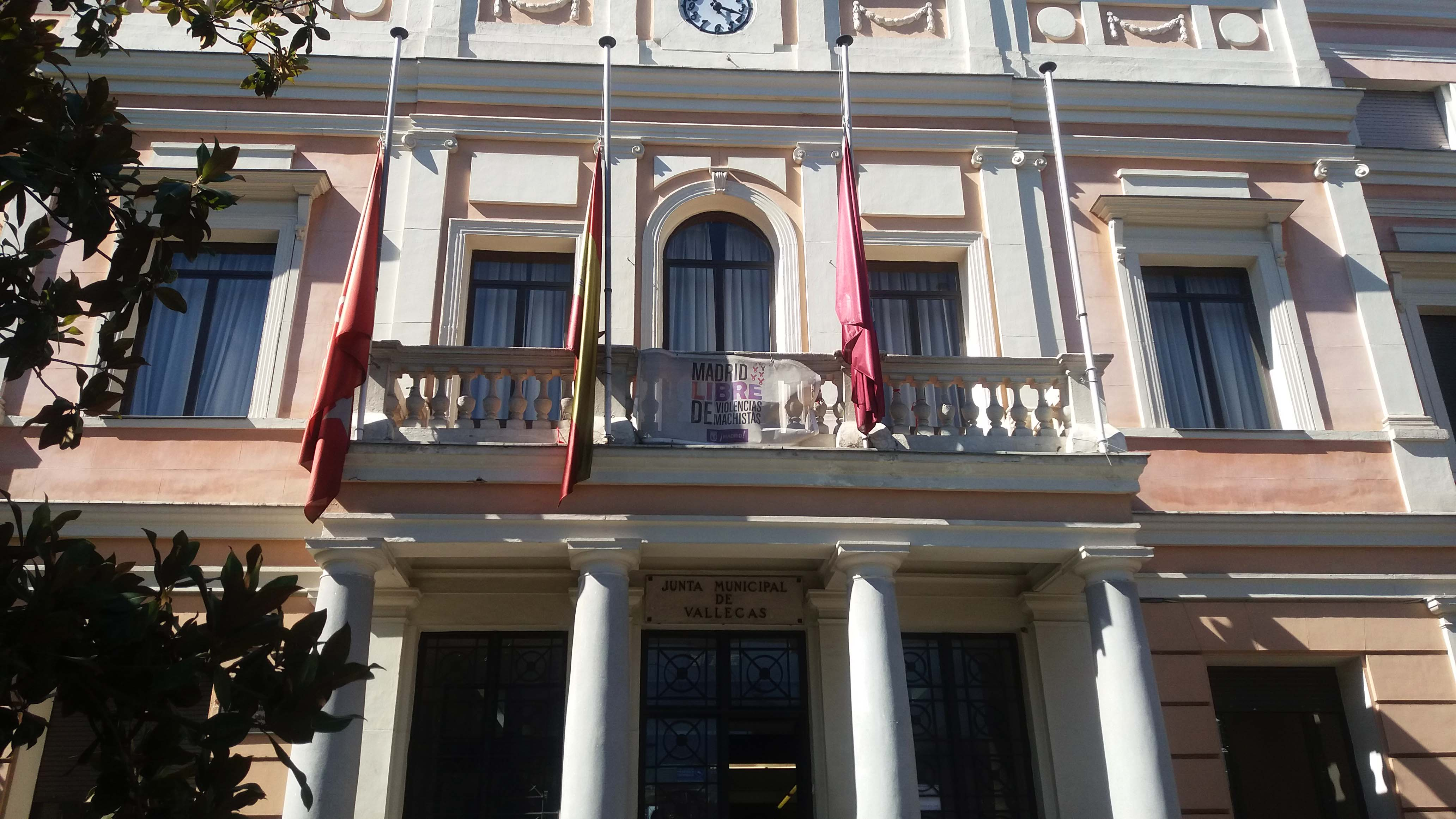 Las banderas de las Juntas Municipales de los Distritos Puente y Villa de Vallecas ondean a media asta hasta el próximo lunes en homenaje al campeón 12+1 Ángel Nieto, surgido de los barrios de Vallecas.